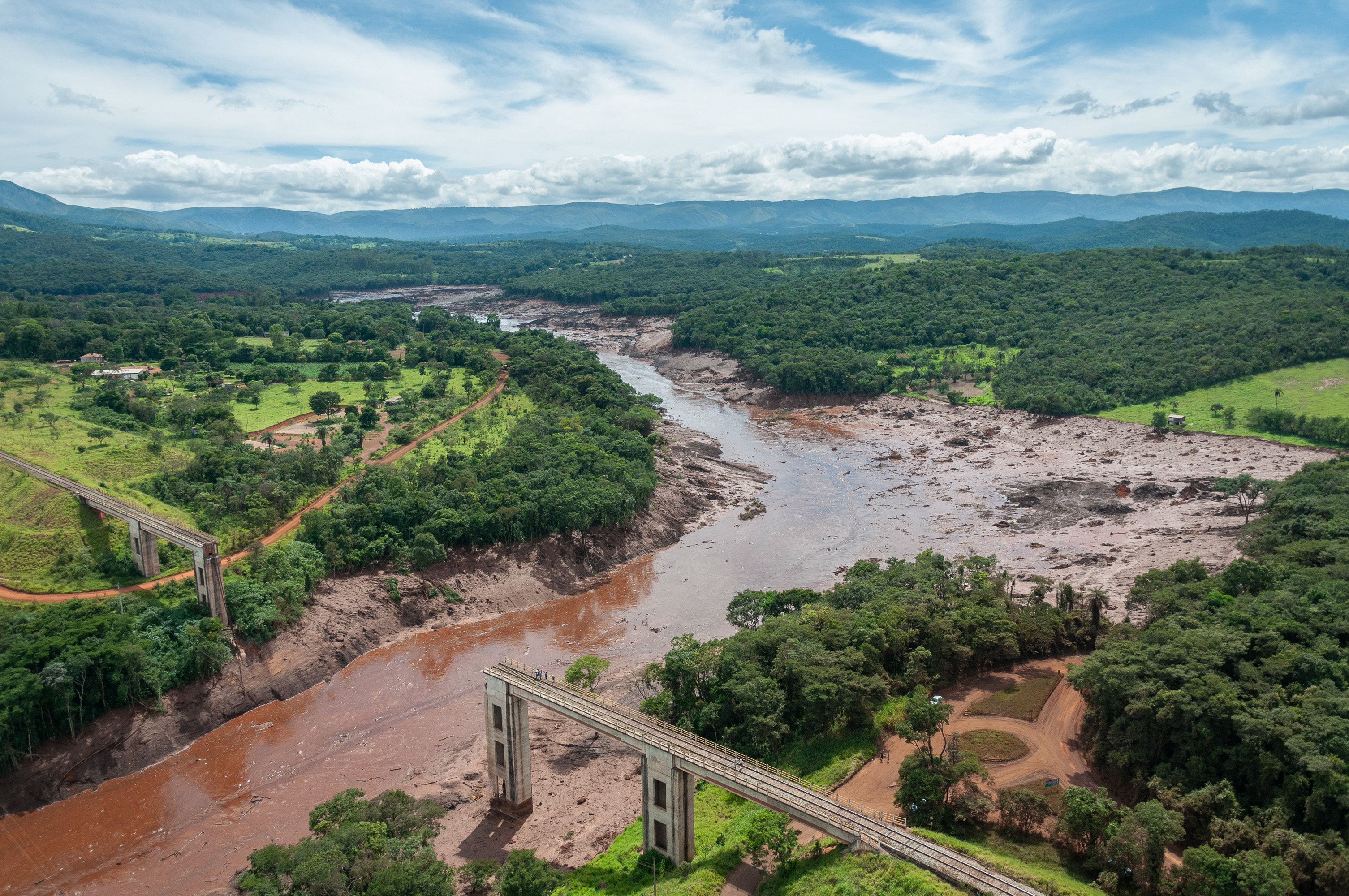 Catástrofe socioambiental provocada pelo rompimento de barragem da mineradora Vale em Brumadinho (MG) Foto: Vinícius Mendonça/Ibama Mais informações: Rompimento de barragem da Vale em Brumadinho (MG) destruiu 269,84 hectares Ibama multa Vale em R$ 250 milhões por catástrofe em Brumadinho (MG)